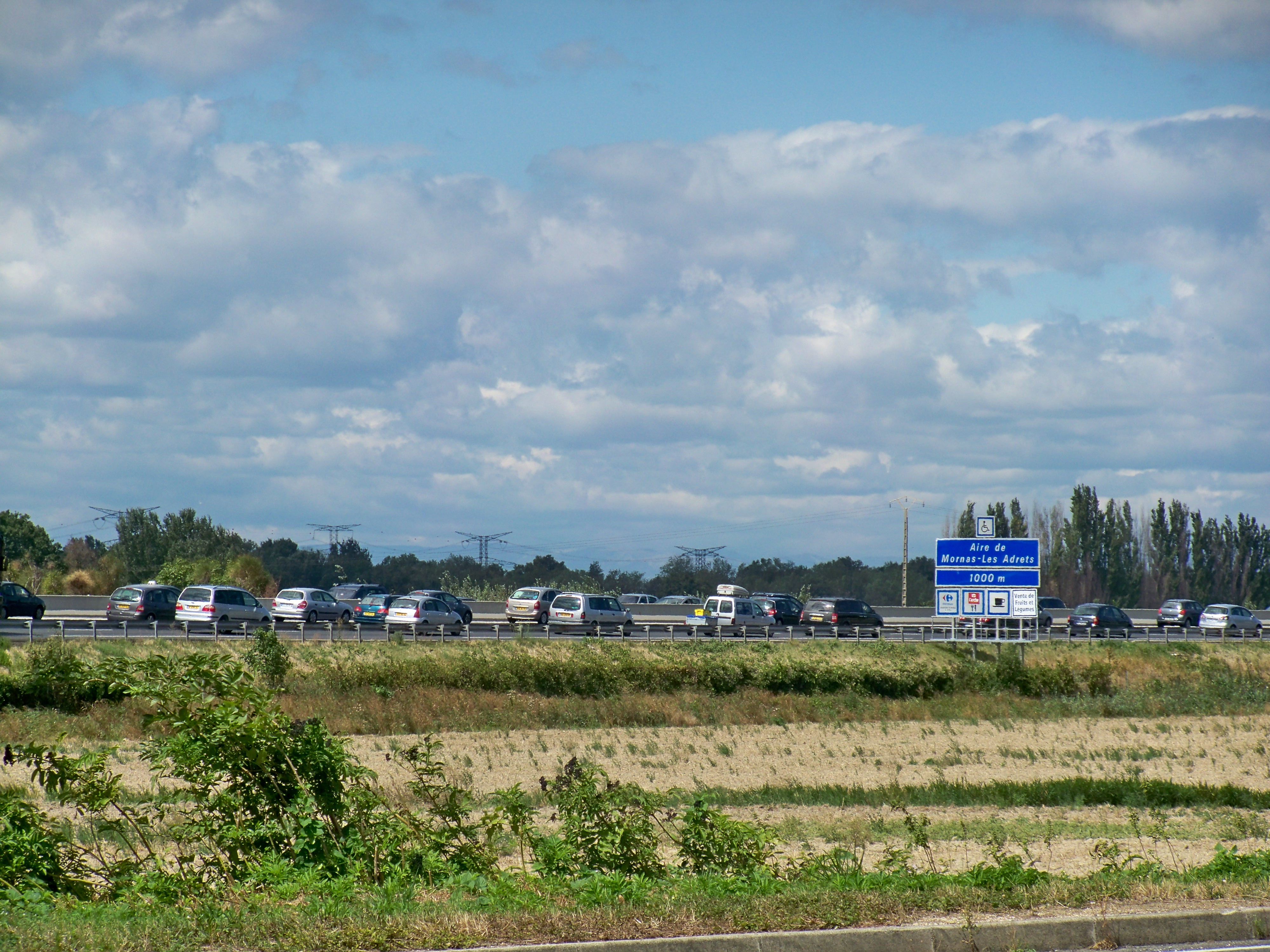 Autoroute française A7, au niveau de Mornas (Vaucluse), qui a donné son nom à l'une des airs de repos de cet axe routier.